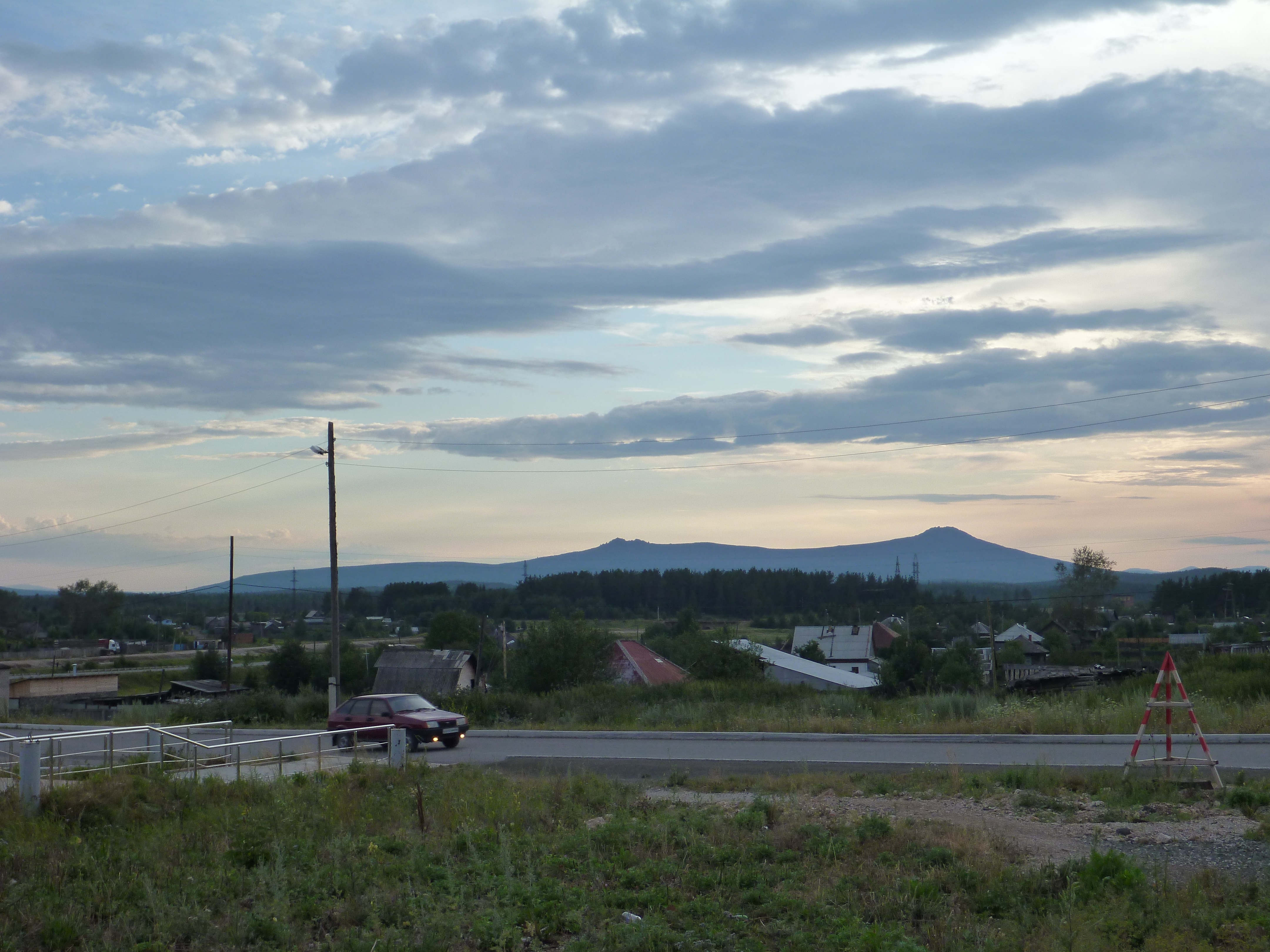 Кумба и Золотой Камень